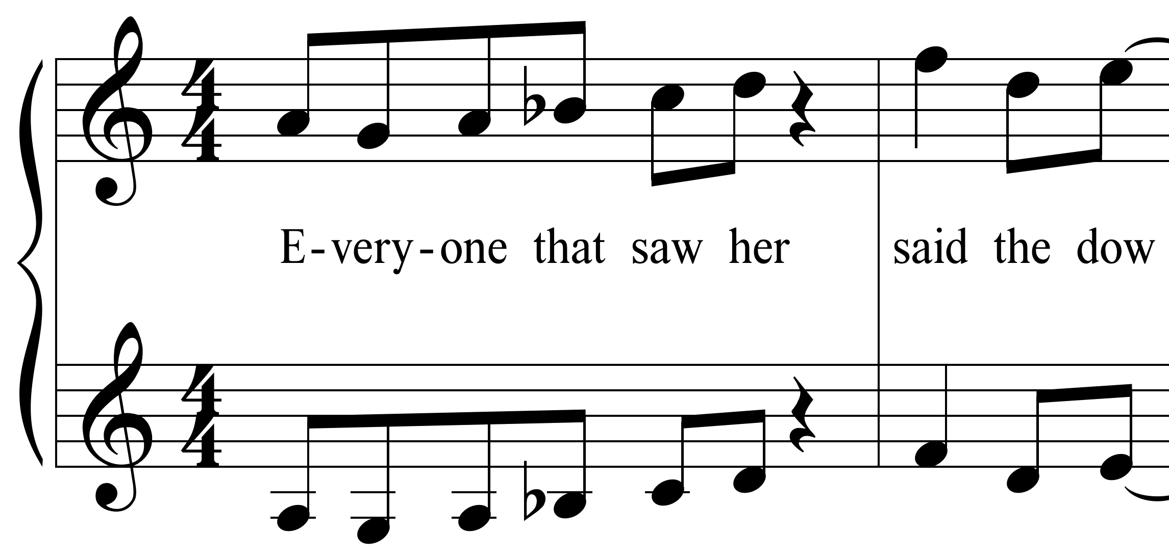 "Ritournelle" de la fausse chanson irlandaise d'Anna Livia Plurabelle